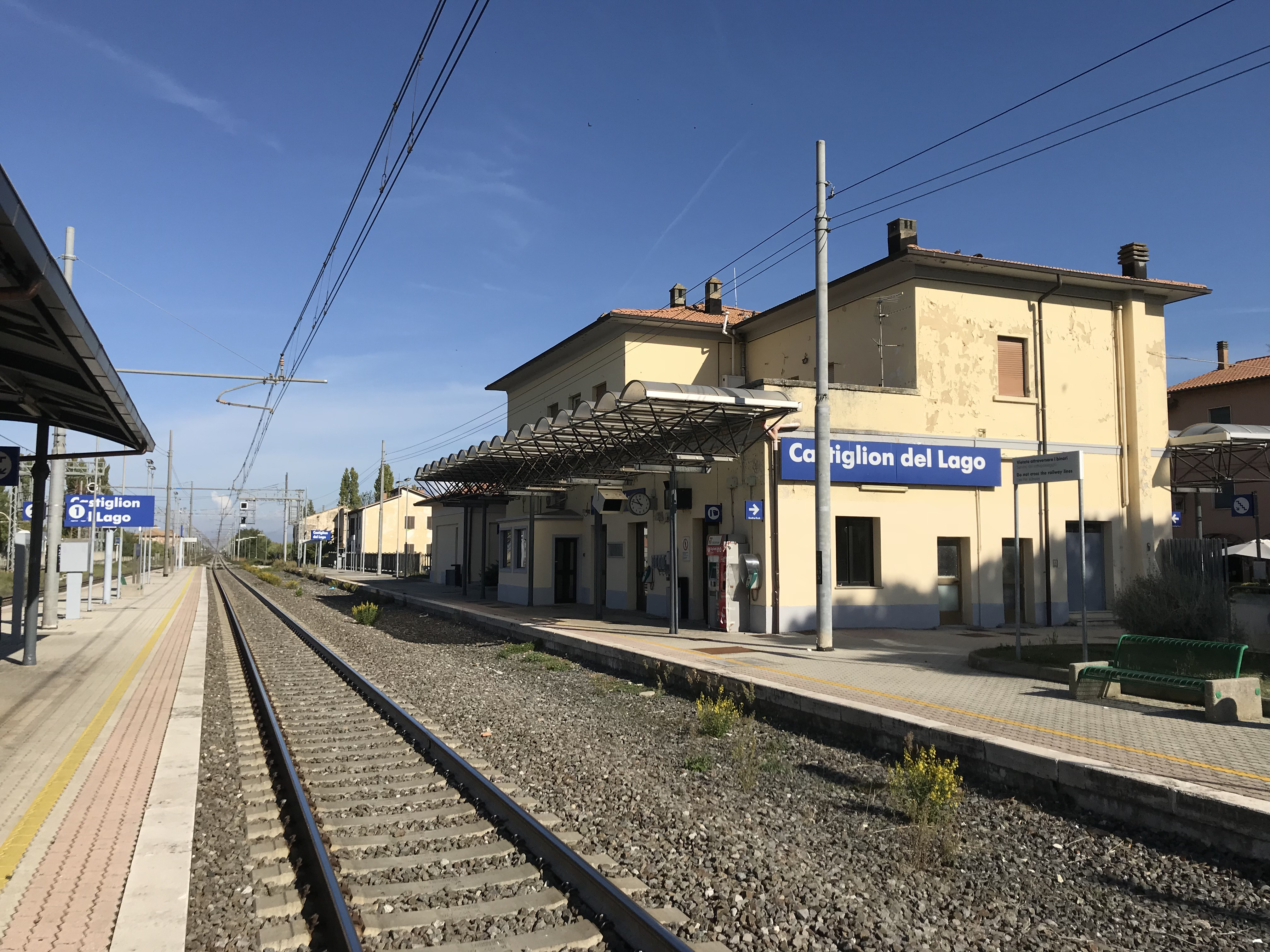 Station Castiglion